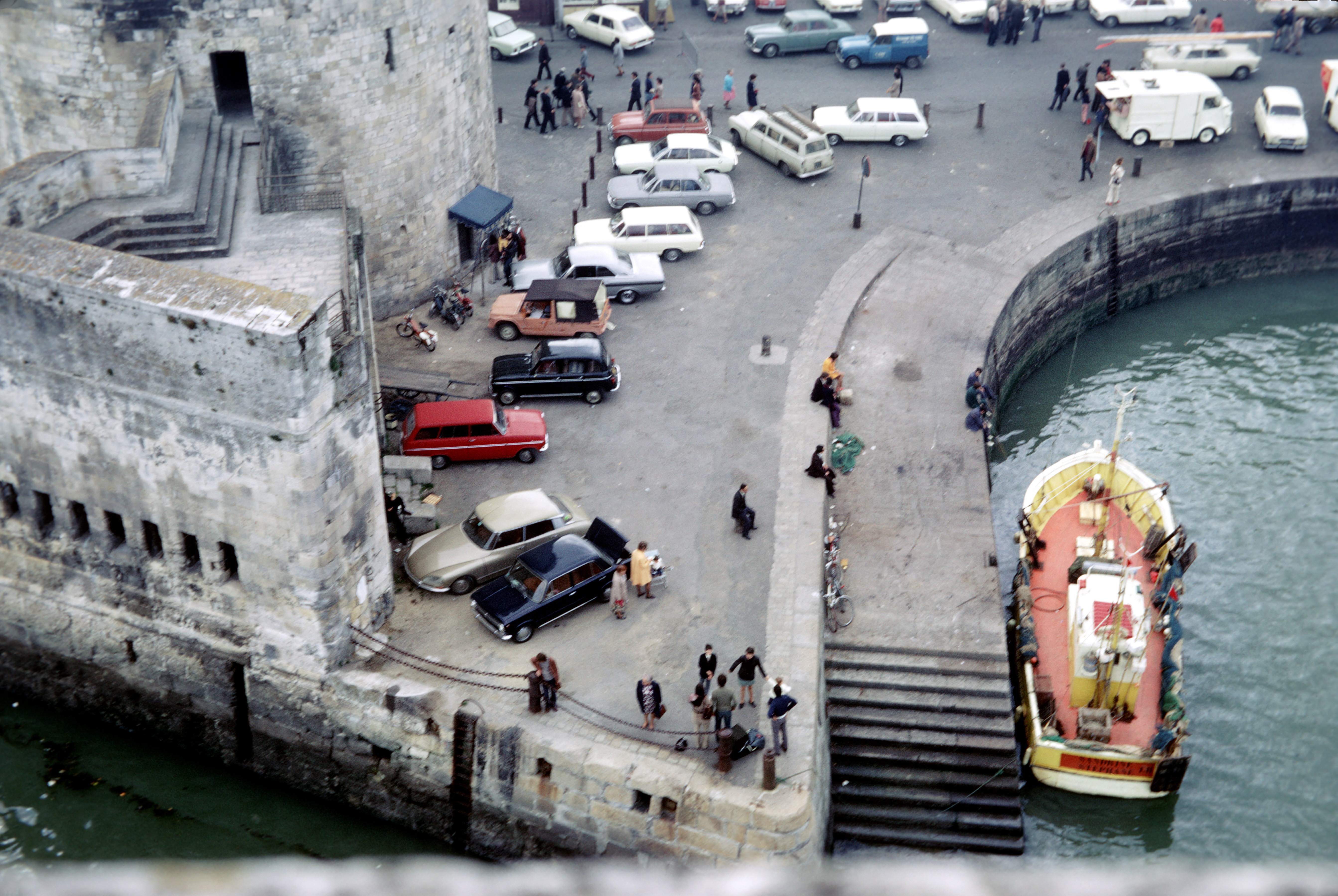 Dans le Bassin d' échouage, près de l' Escalier des Sardiniers, le chalutier à pêche lattérale "Sandrine Stéphane" construit en 1971 à Bourcefranc. LHT 11,92 mètres. Coque en bois. Immatriculation: LH 316464. Démoli en 1997 (GV 316464 Pourquoi Pas). La Rochelle, Charente Maritime, France.